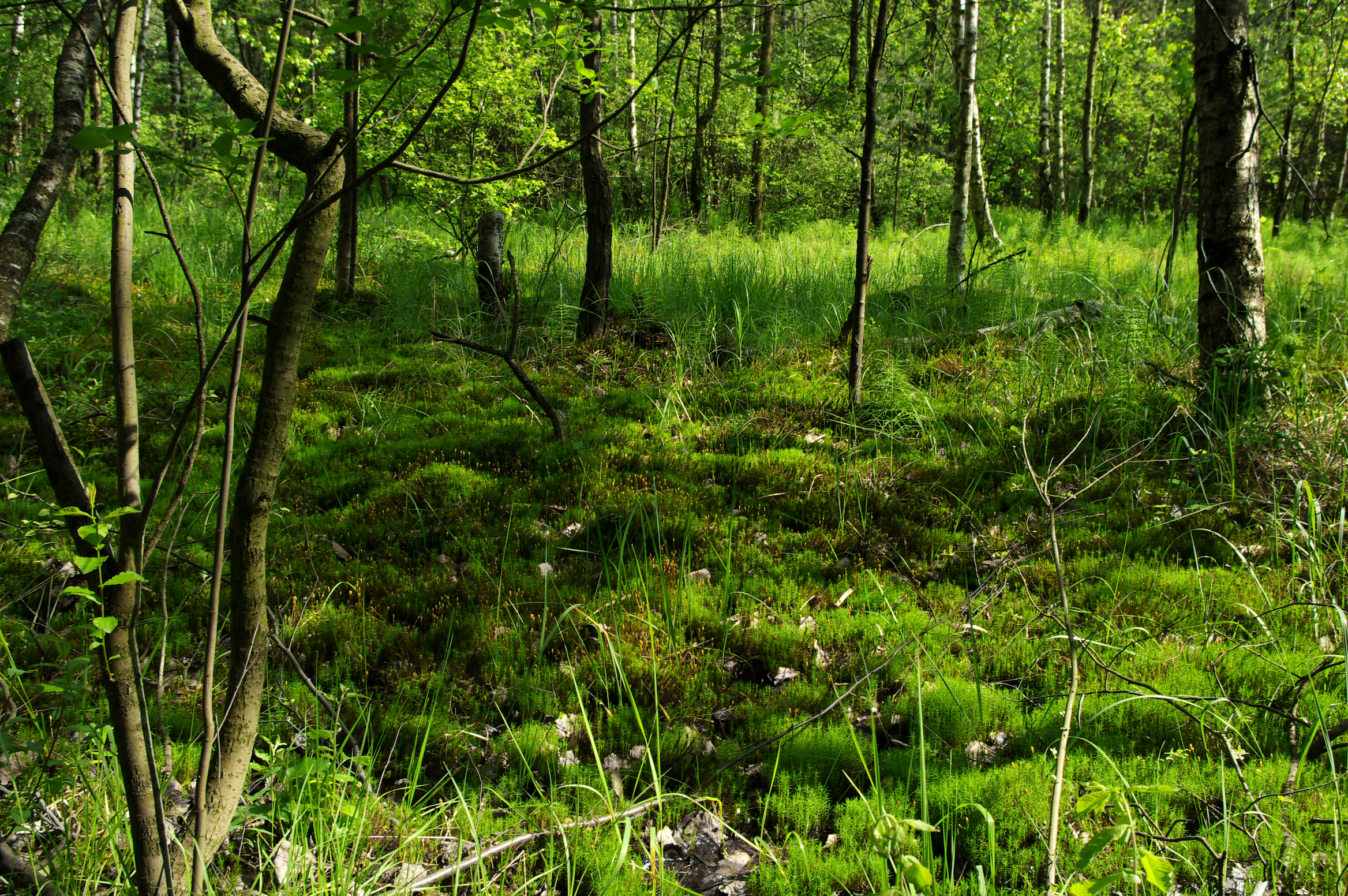 Scheuchzerio-Caricetea nigrae, Młaki nad Pogorią I - strona północna.